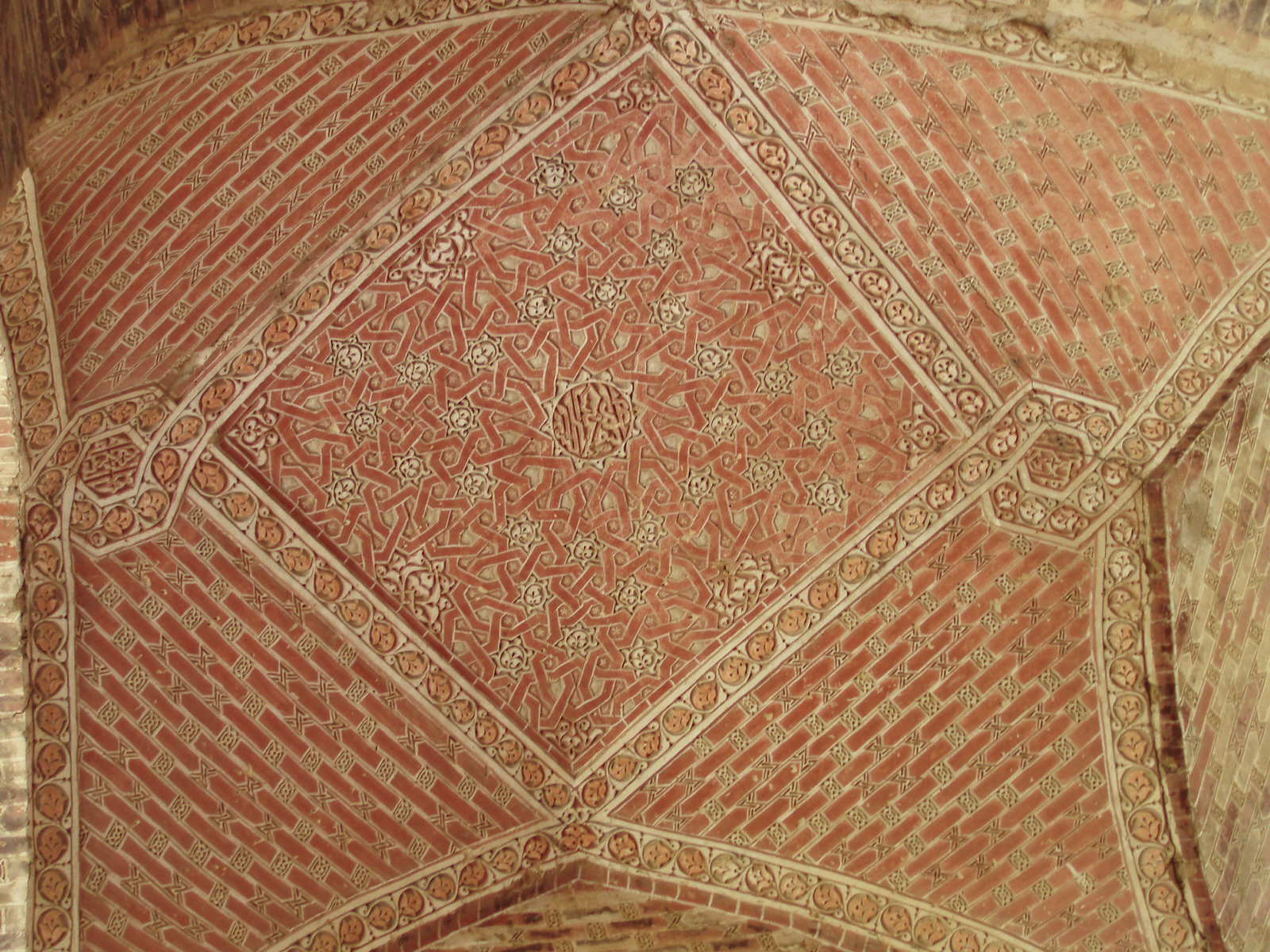 Iran 2007 038 Mausoleum of Öljaitü Muhammad Khodabandeh